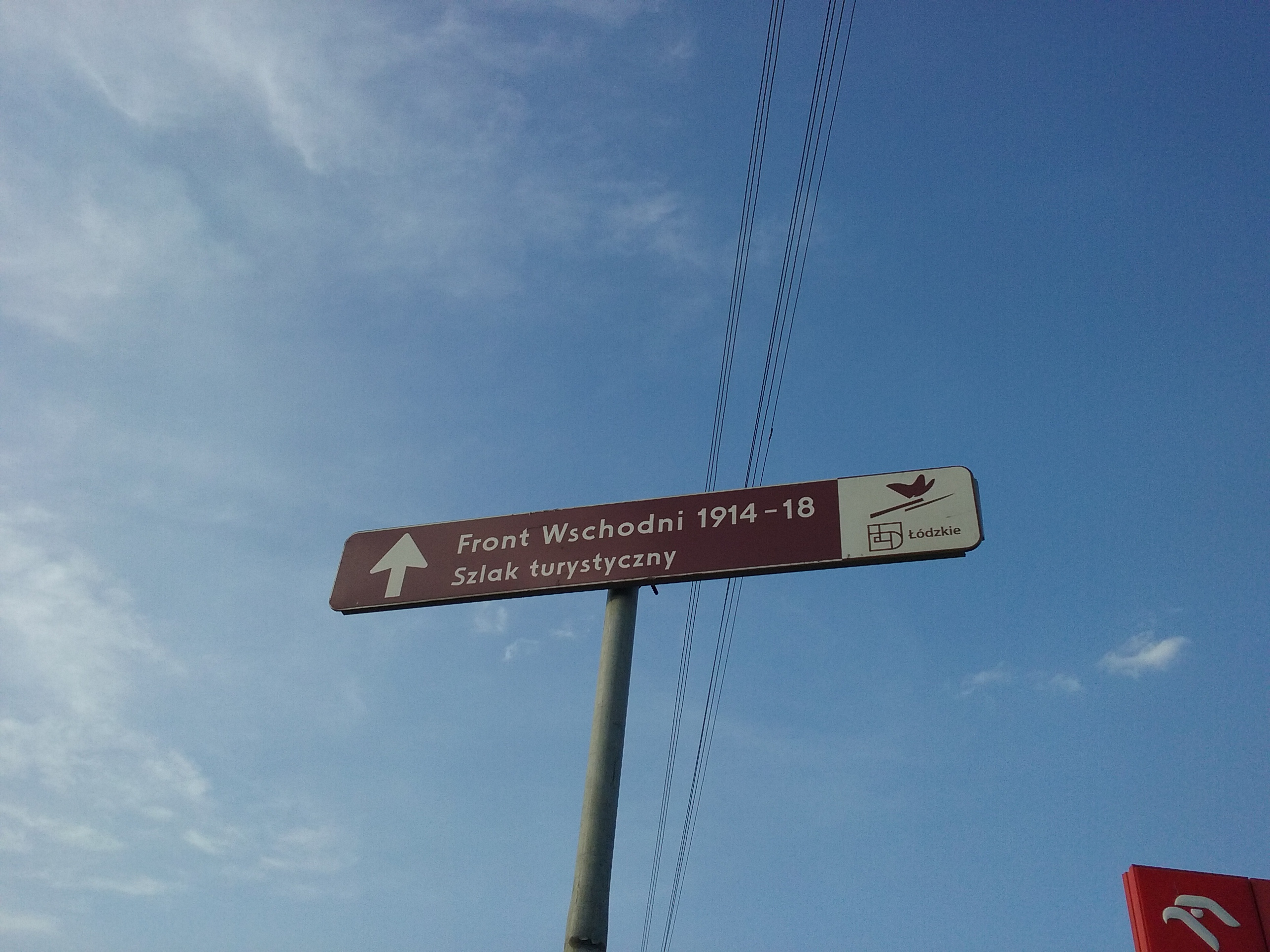 Tomaszów Mazowiecki w województwie łódzkim, PL, EU. Tablica informacji turystycznej informująca o przebiegu frontu wschodniego podczas pierwszej wojny światowej. Róg ulic Tamka i Warszawskiej w Tomaszowie. CC0